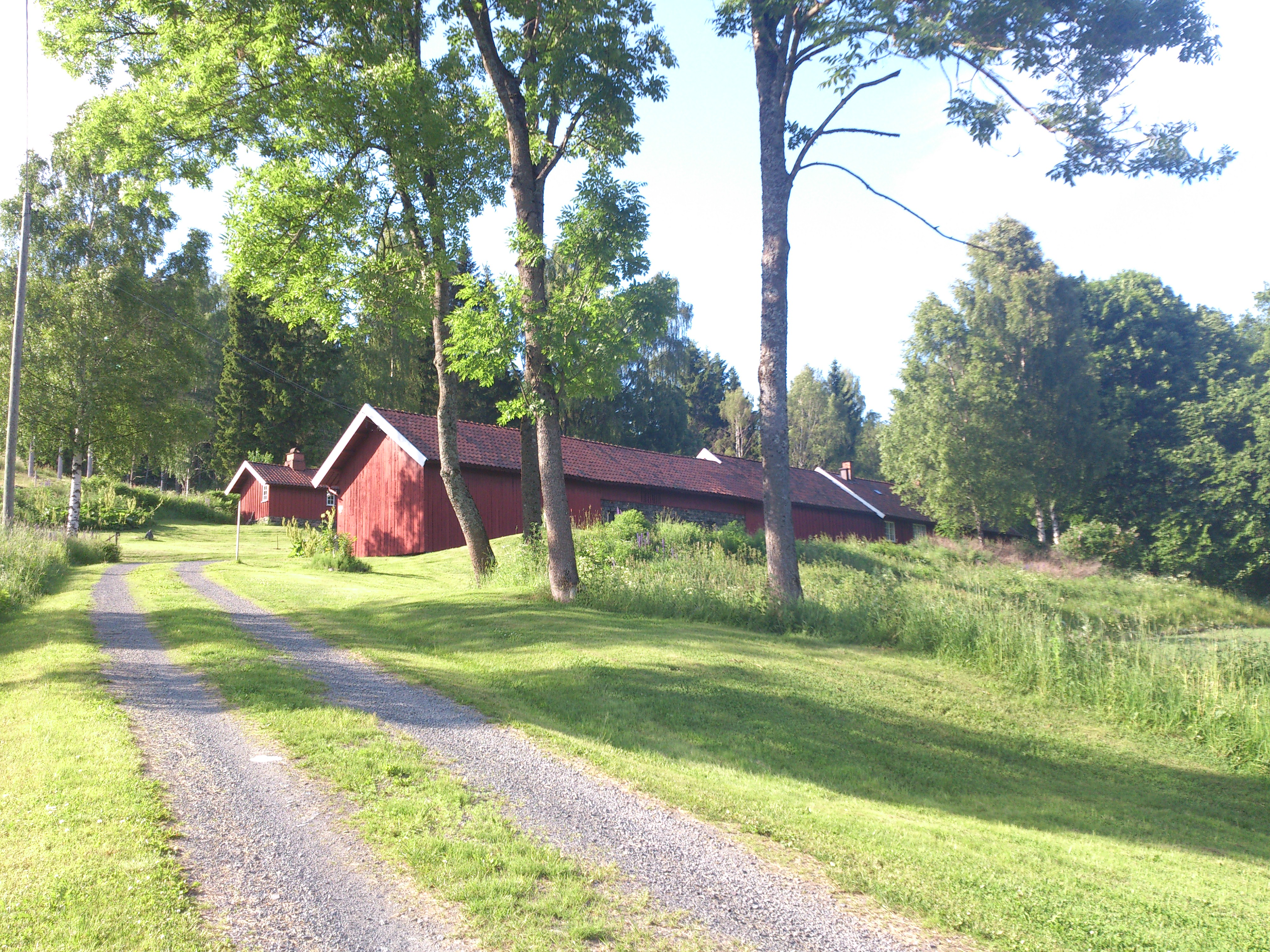 Husmannsplass, Eplehaugen, Bærums Verk, Norway